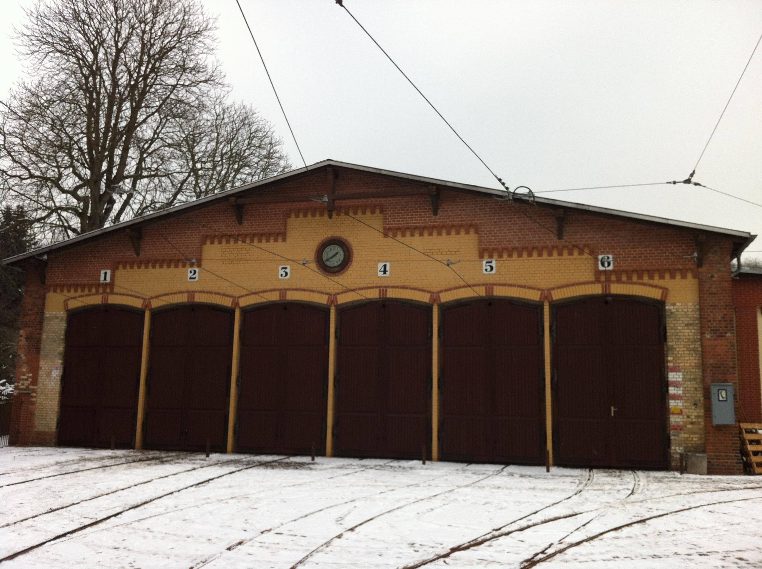 Abstellanage des ehemaligen Straßenbahndepots in der Seebener Str. Halle (Saale). Heute Straßenbahnmuseum Halle.